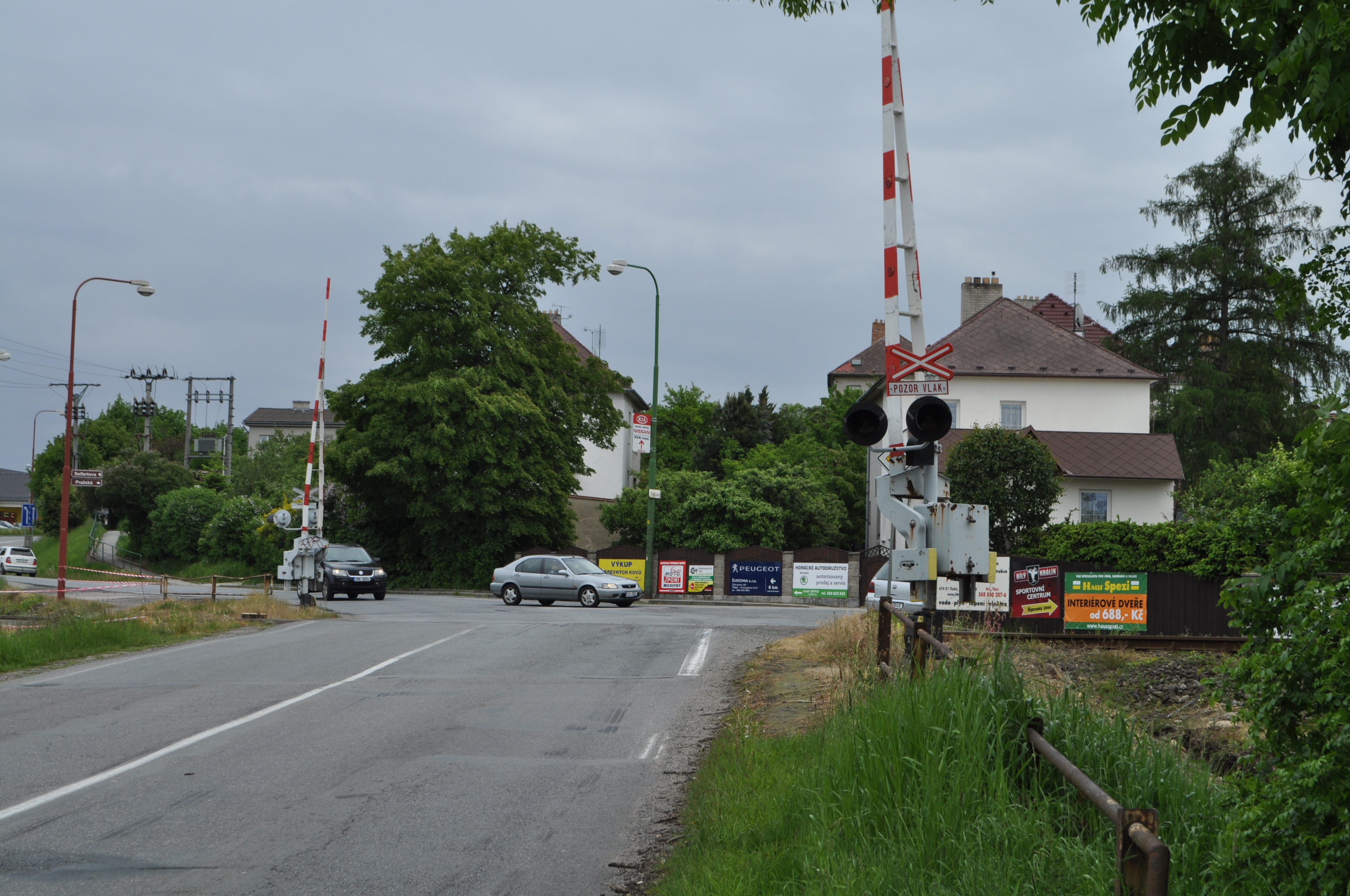 Železniční přejezd typu SSSR křížící silnici I/23 v Třebíči - Borovině